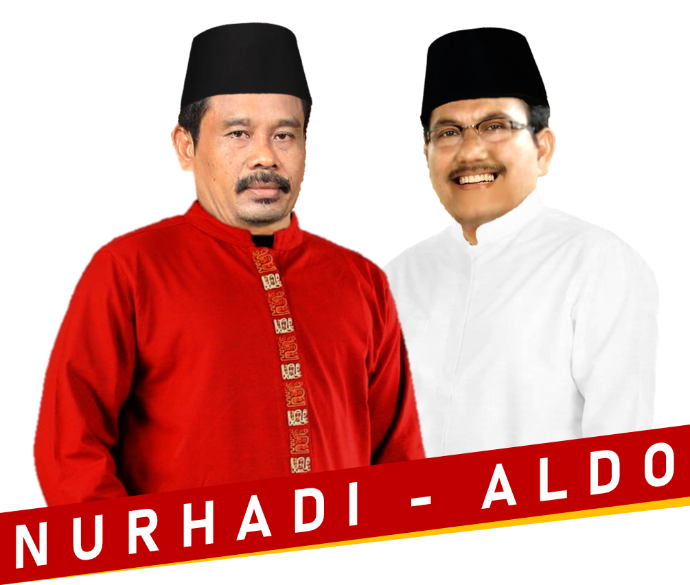 Pasangan Capres - Cawapres Nomor Urut 10